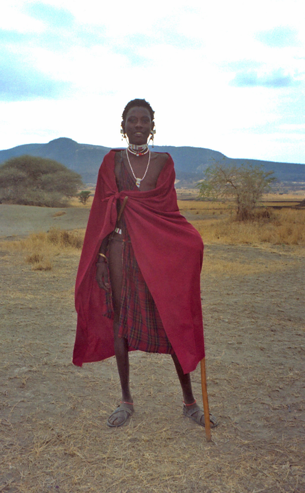 Maasai boy. Masai Mara, Kenya 1993.1993 #167-19A Masai boy